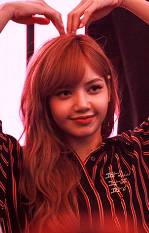 6월 23일 블랙핑크 팬사인회